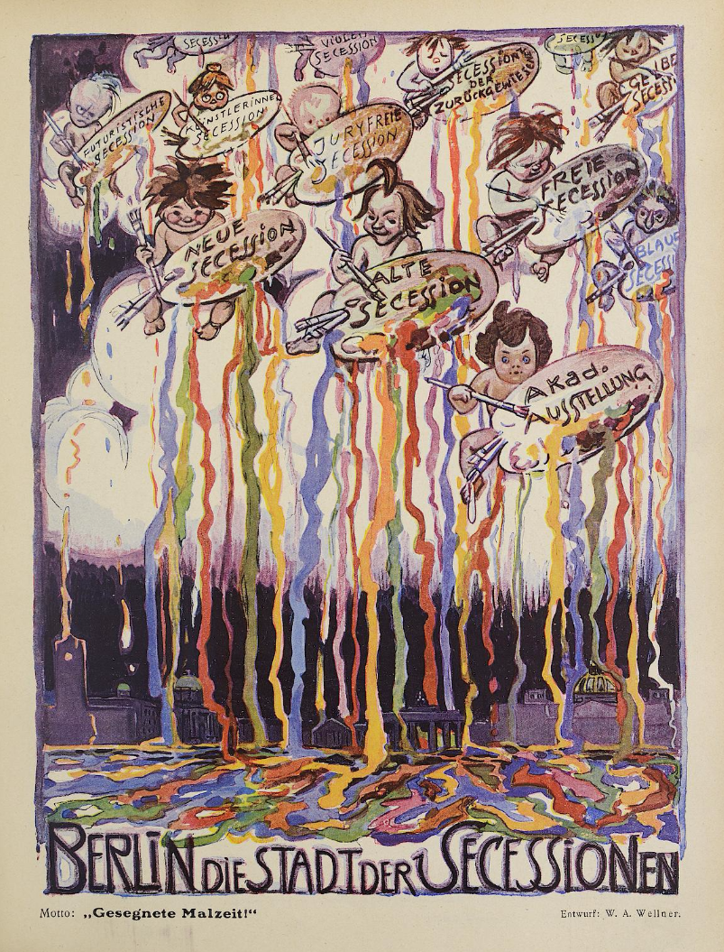 W. A. Wellner: - Berlin, die Stadt der Secessionen - Lustige Blätter Nr 24-1914